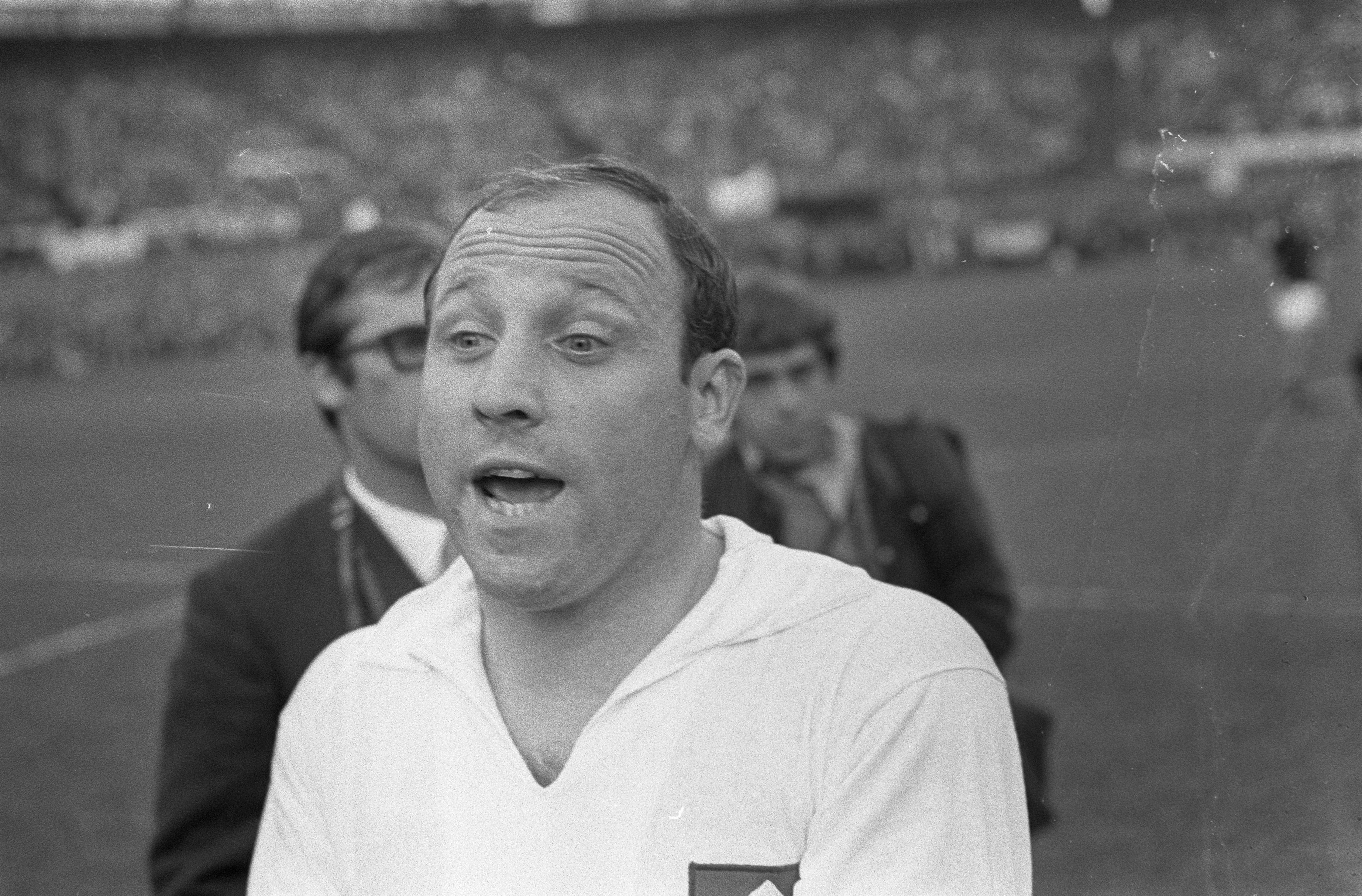 Collectie / Archief : Fotocollectie Anefo Reportage / Serie : [ onbekend ] Beschrijving : Finale Europa Cup II AC Milan tegen HSV Hamburg 2-0. Uwe Seeler Datum : 23 mei 1968 Locatie : Rotterdam Trefwoorden : voetbal, voetballers Persoonsnaam : Seeler, Uwe Instellingsnaam : AC Milaan Fotograaf : Kroon, Ron / Anefo Auteursrechthebbende : Nationaal Archief Materiaalsoort : Negatief (zwart/wit) Nummer archiefinventaris : bekijk toegang 2.24.01.05 Bestanddeelnummer : 921-3780